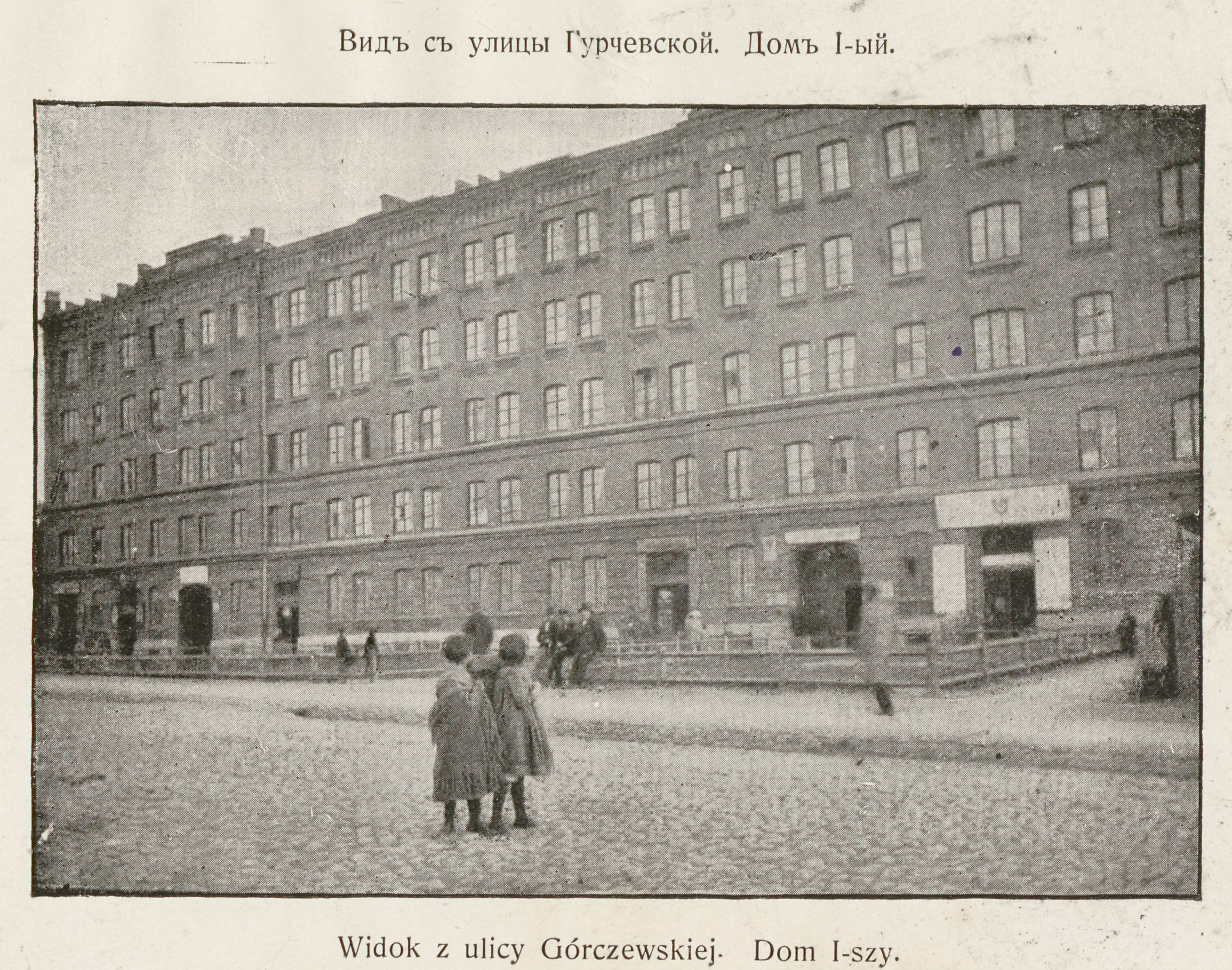 Kolonia Wawelberga